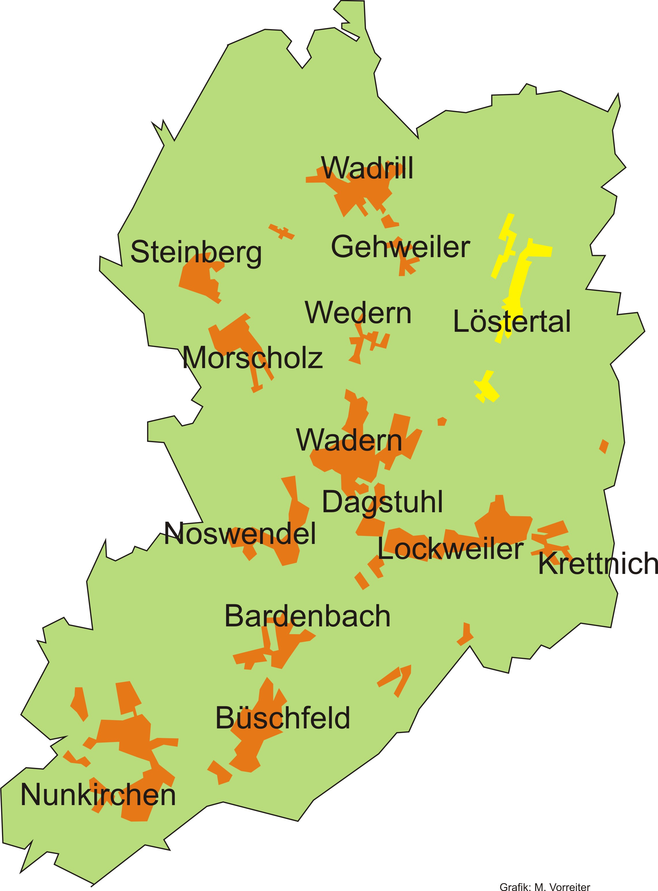 Lage des Stadtteils Löstertal im Stadtgebiet